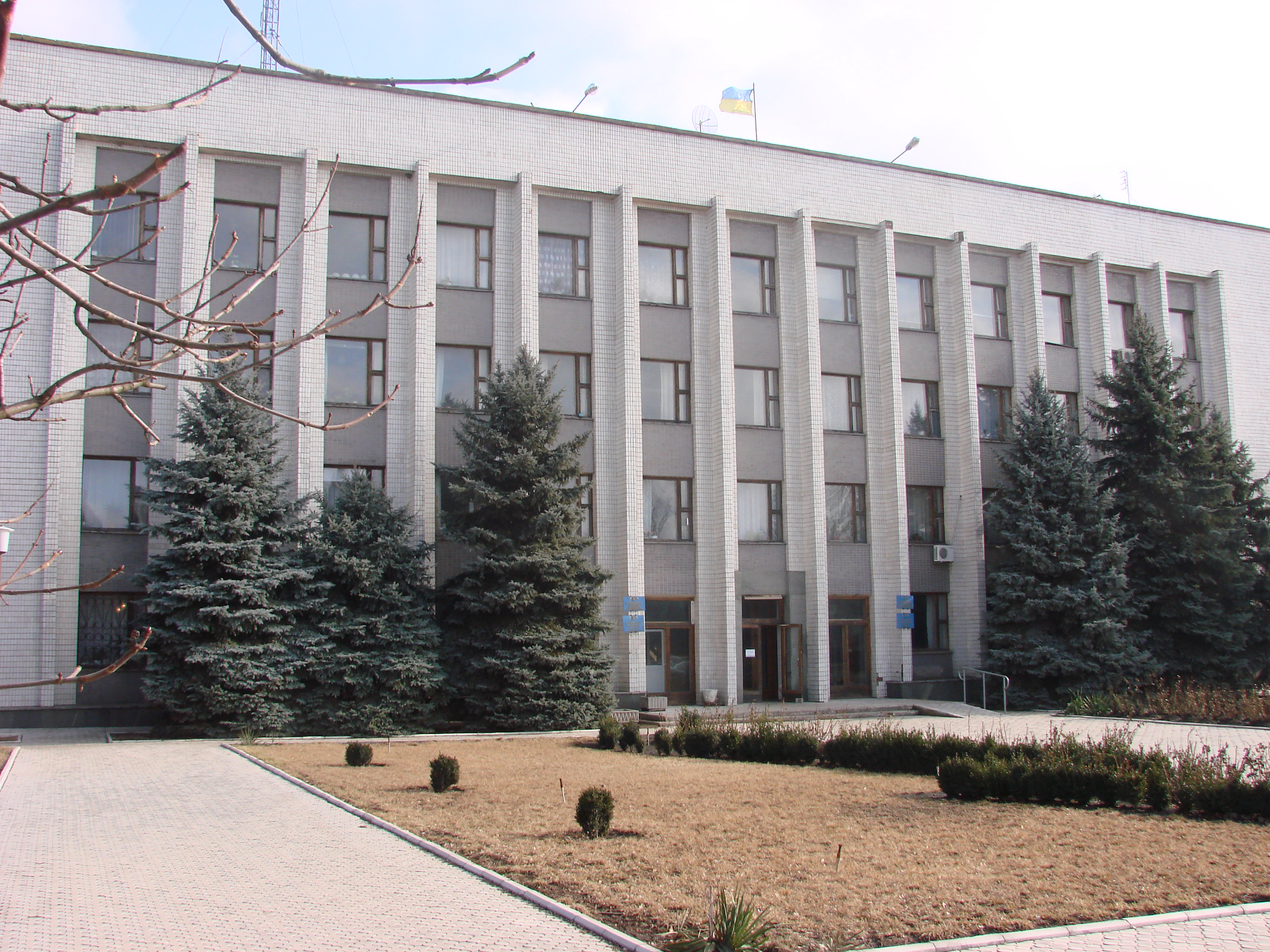 РайДержАдміністрація. смт. Володарське, Донецької області (Україна)